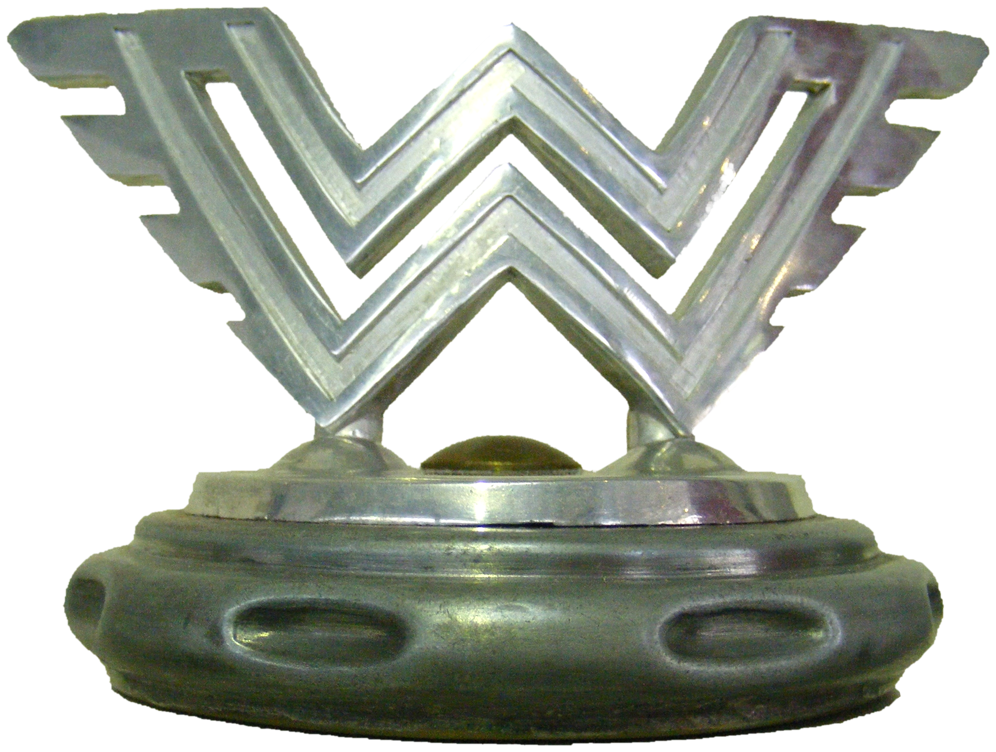 Kühleremblem der Wanderer-Werke A.G. (W26) — Exponat im Deutschen Museum Verkehrszentrum München